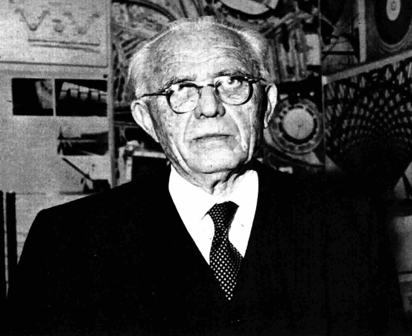 Italian engineer Pier Luigi Nervi